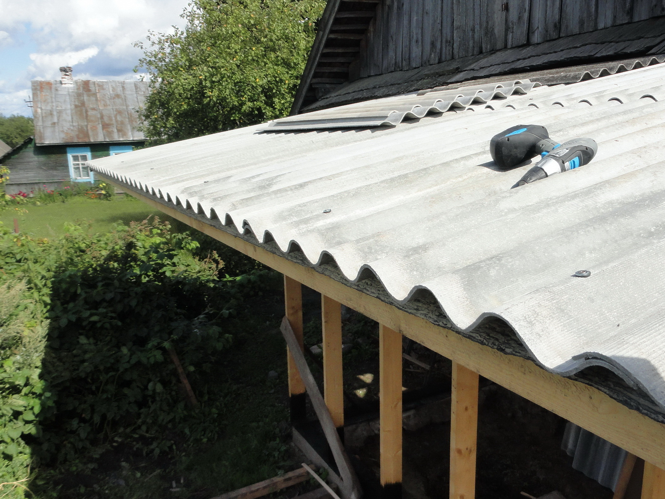 Кровля из хризотилового асбестоцементного шифера